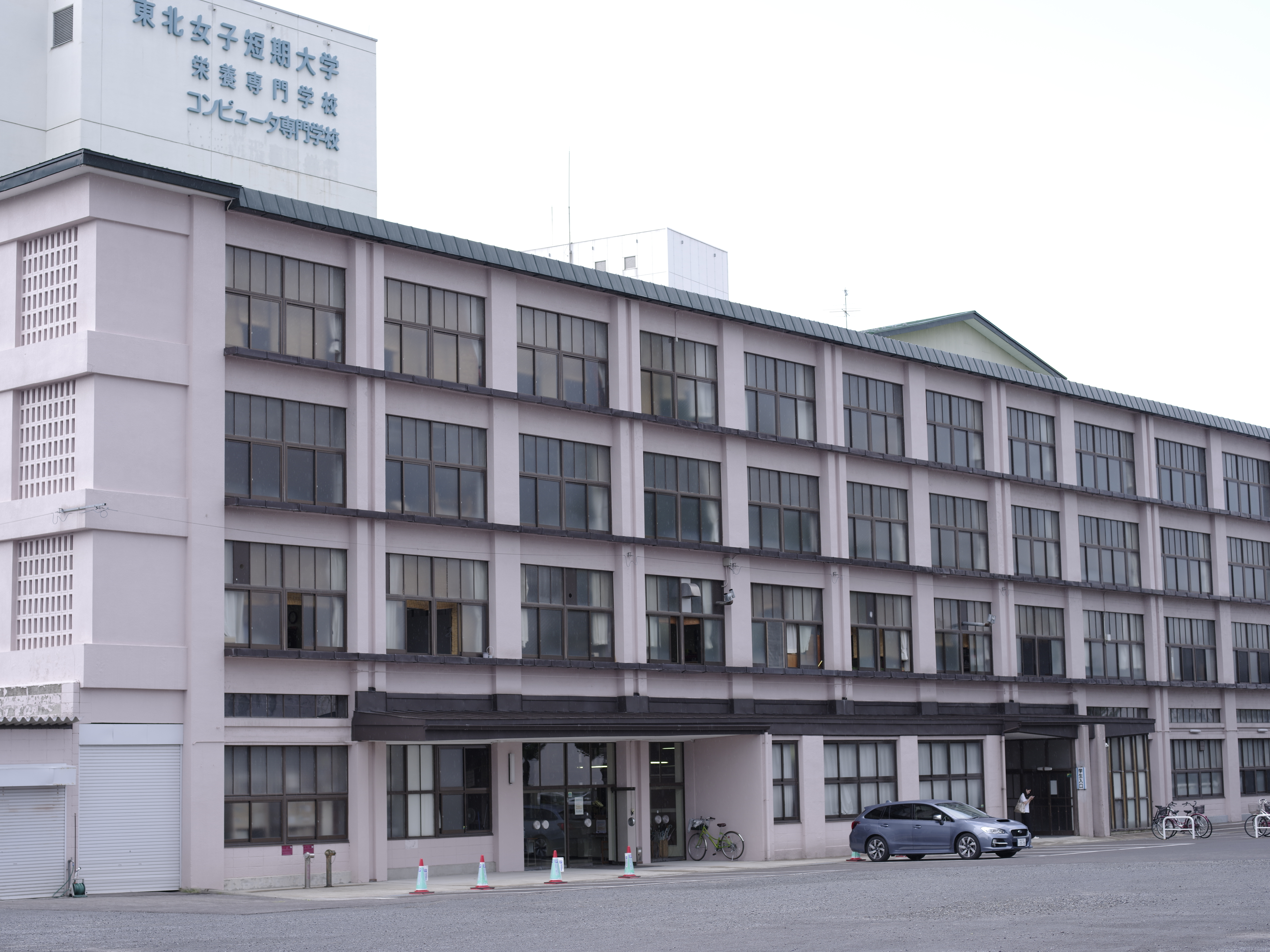 東北女子短期大學。